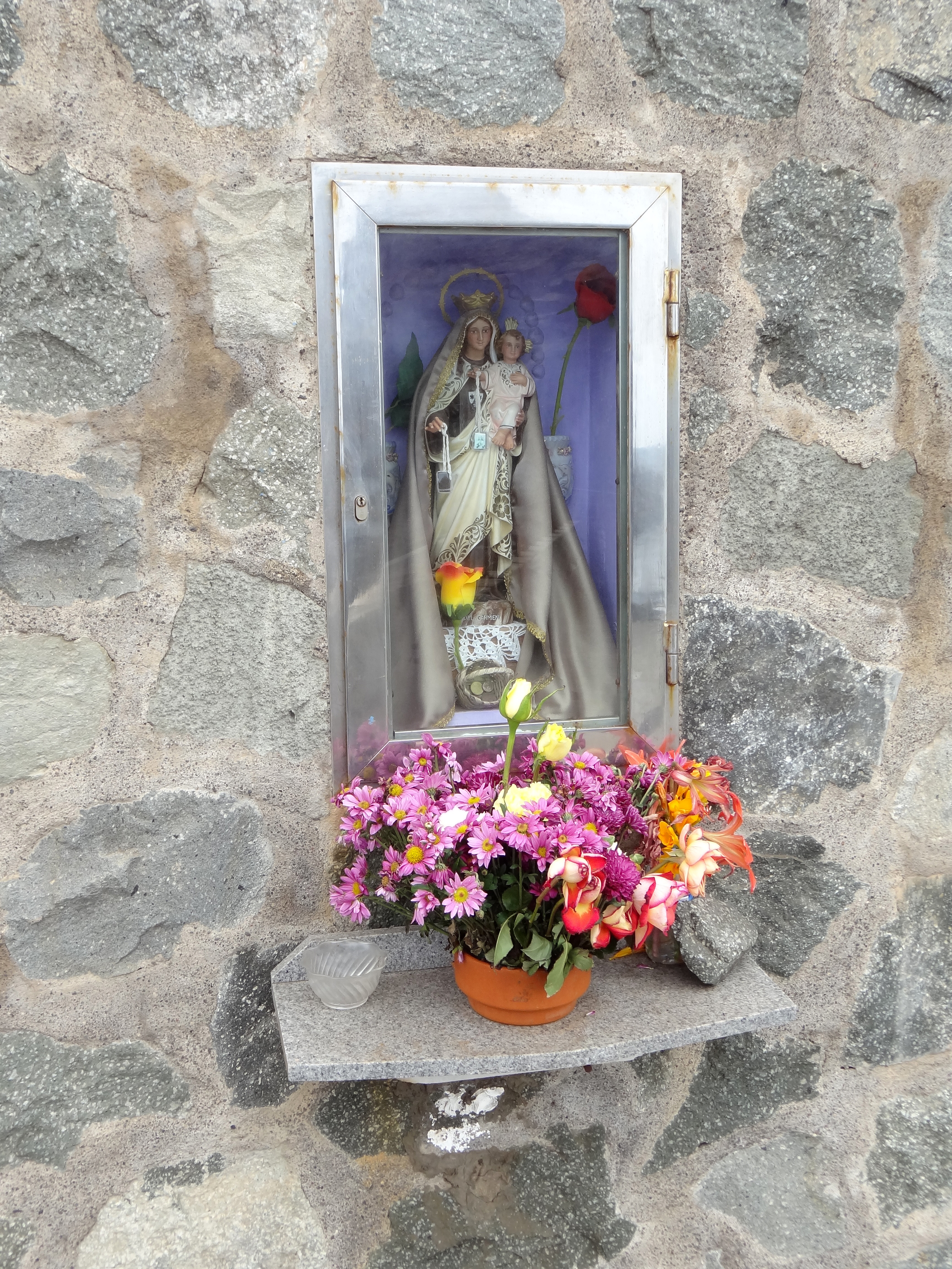 Nis met beeld van Maria met kind in Playa del Roque de las Bodegas, Tenerife